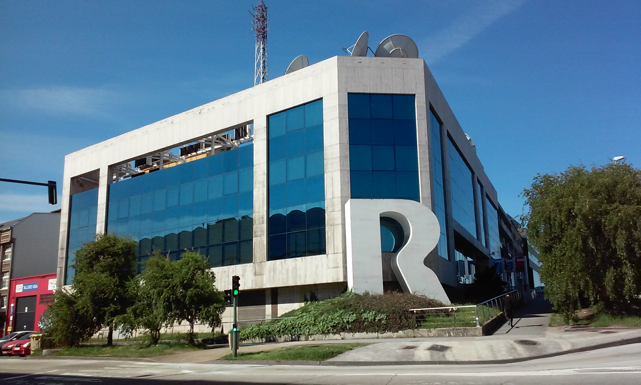 Edificio de R na Grela, A Coruña.